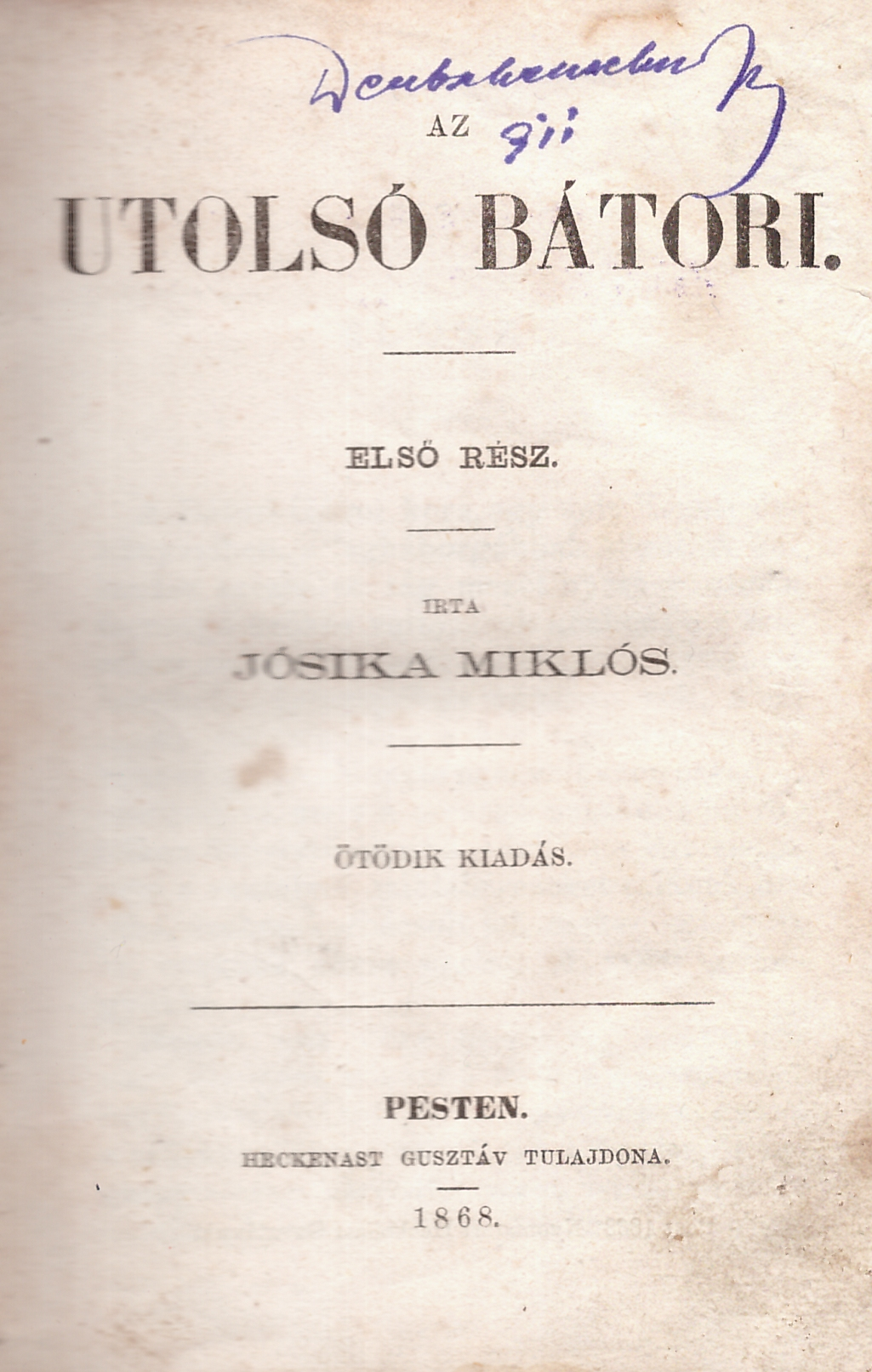 Jósika Miklós (1794-1865): Az utolsó Báthori (5. kiadás, 1868)